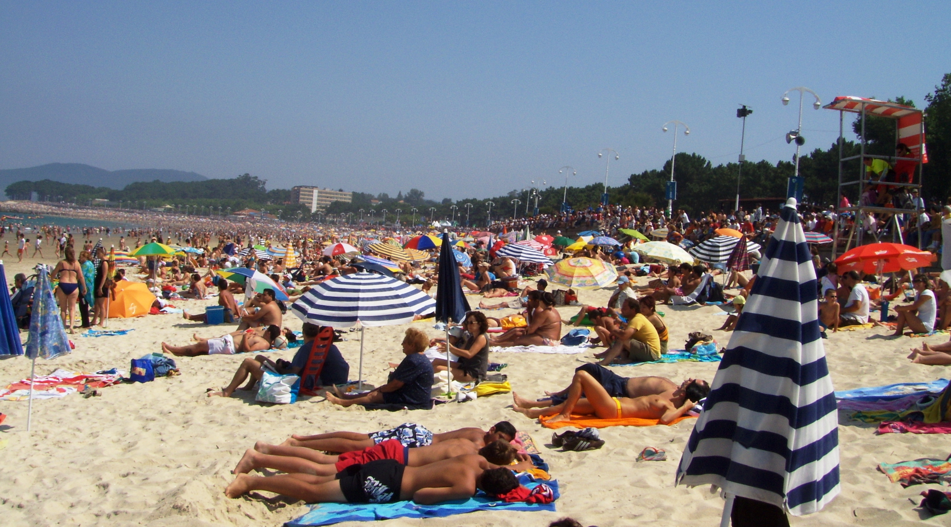 Festival Aéreo Samil 2008, Vigo